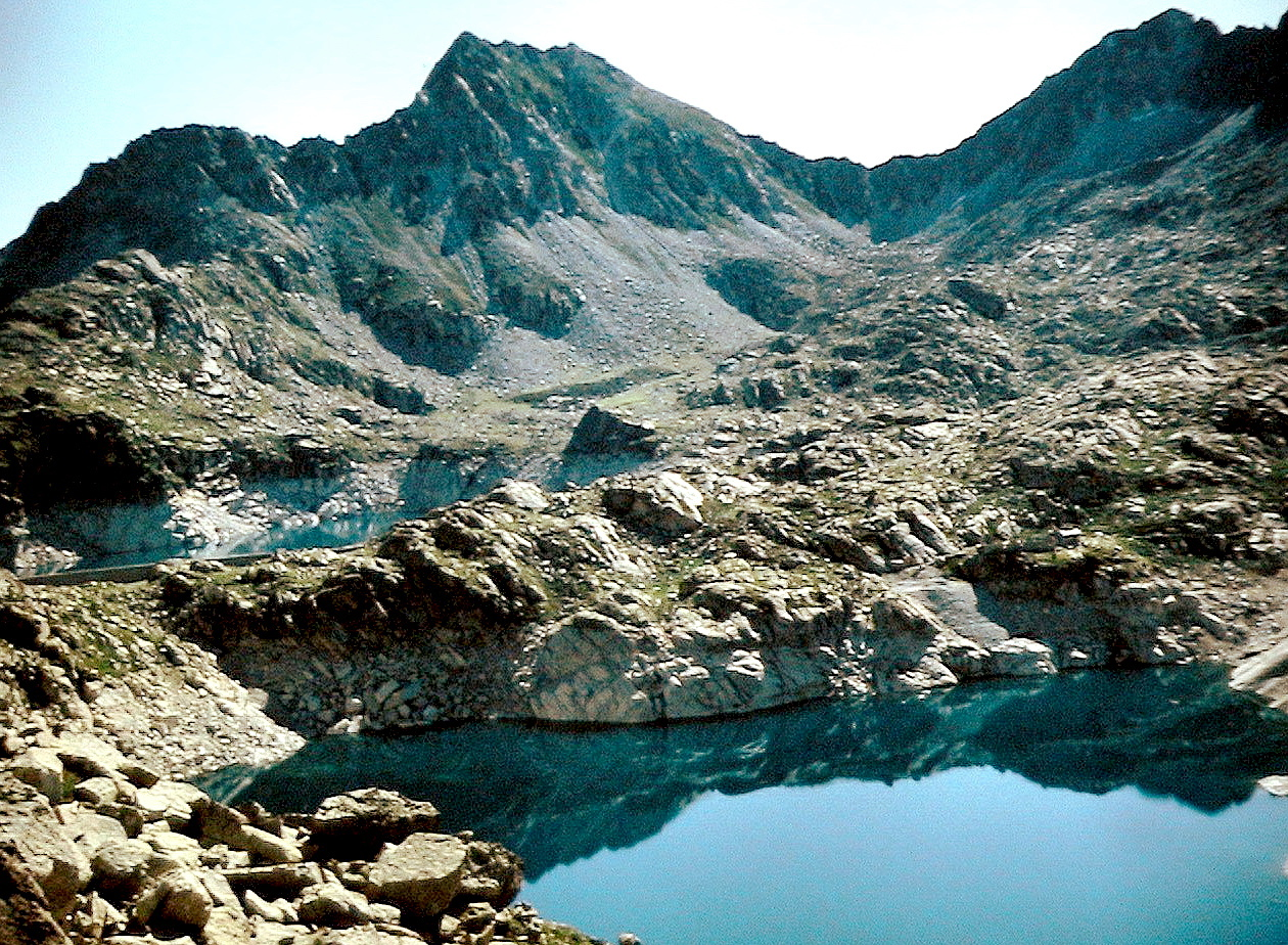 Pic de la Mainera i estany de Colomina. Foto presa de la projecció d'una diapositiva